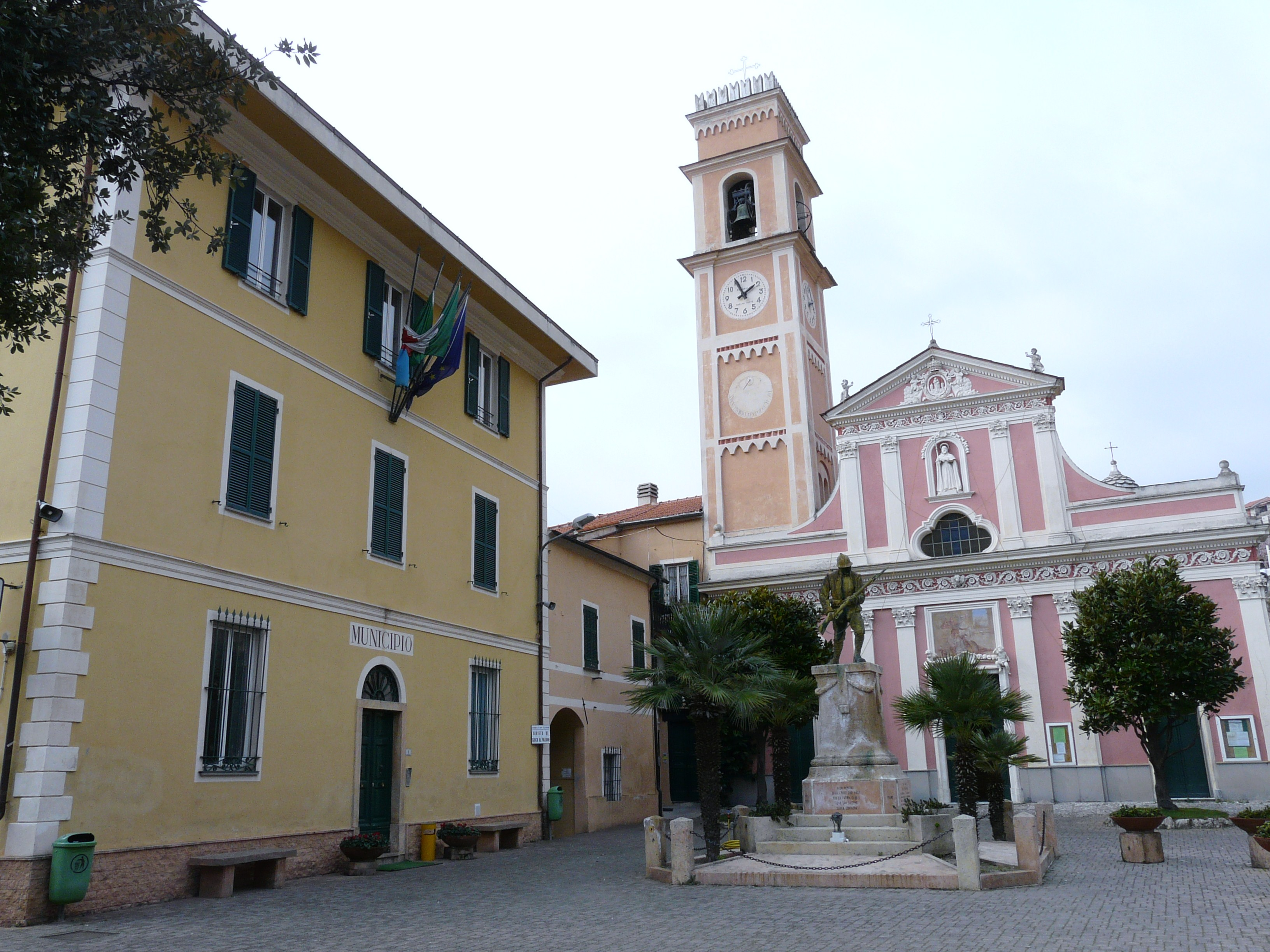 Tovo San Giacomo, Liguria, Italia